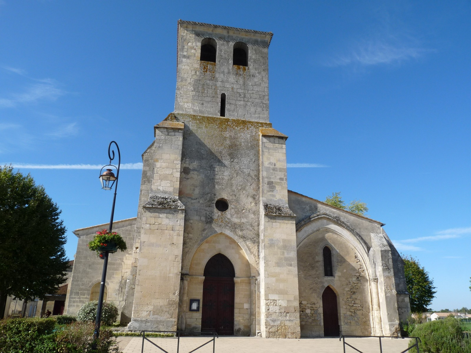 Eglise de Cézac, Gironde, France